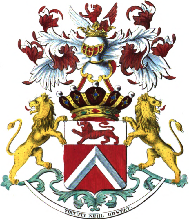 Armoiries de la famille de Maleingreau d'Hembise